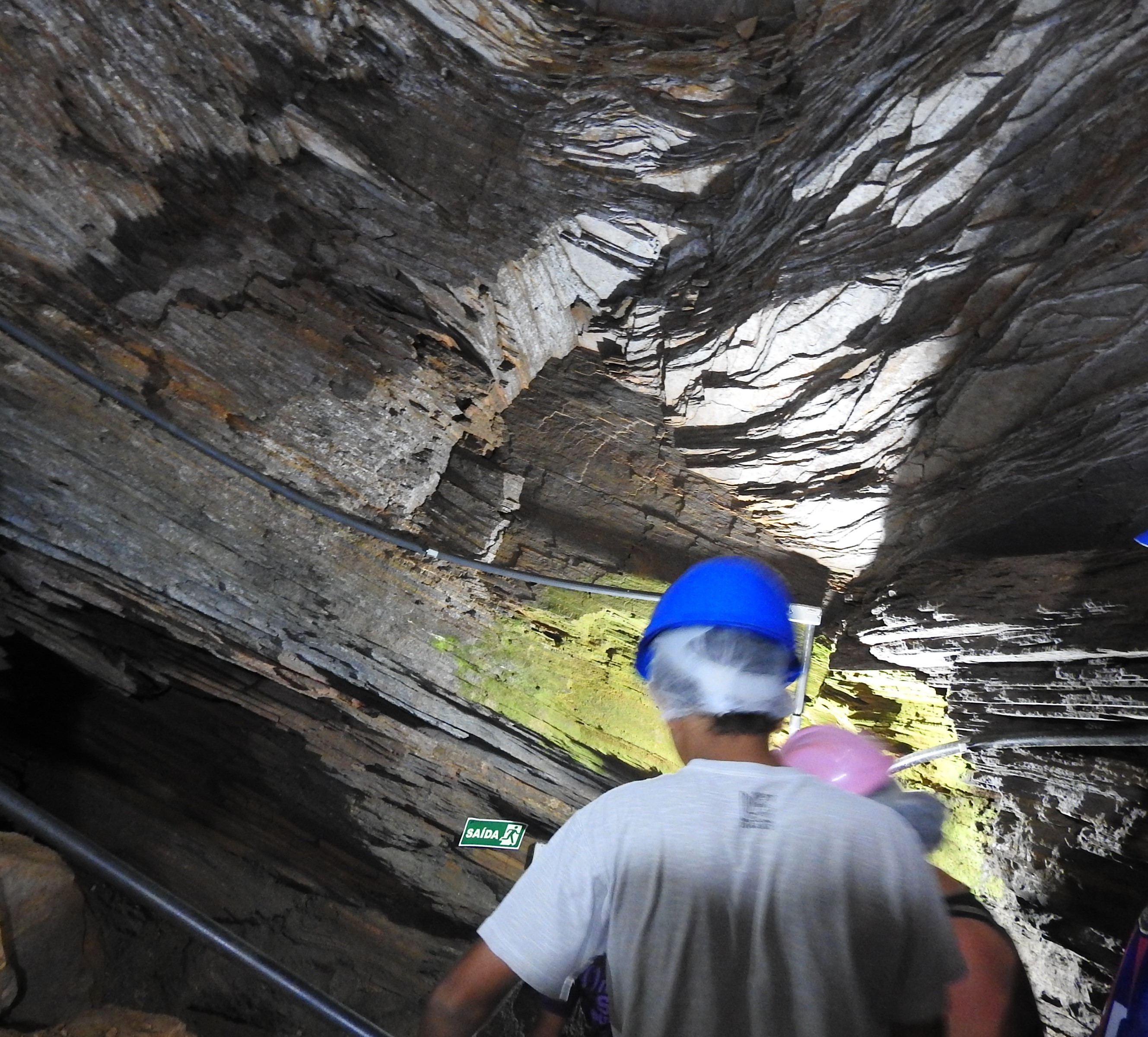 Mina de ouro datada de 1714, localizada em Ouro Preto, aberta por escravos provenientes de Mina, Angola, Quiloa, Benguela, Monjolo, Rebolia, Congo, Cabinda e Moçambique.